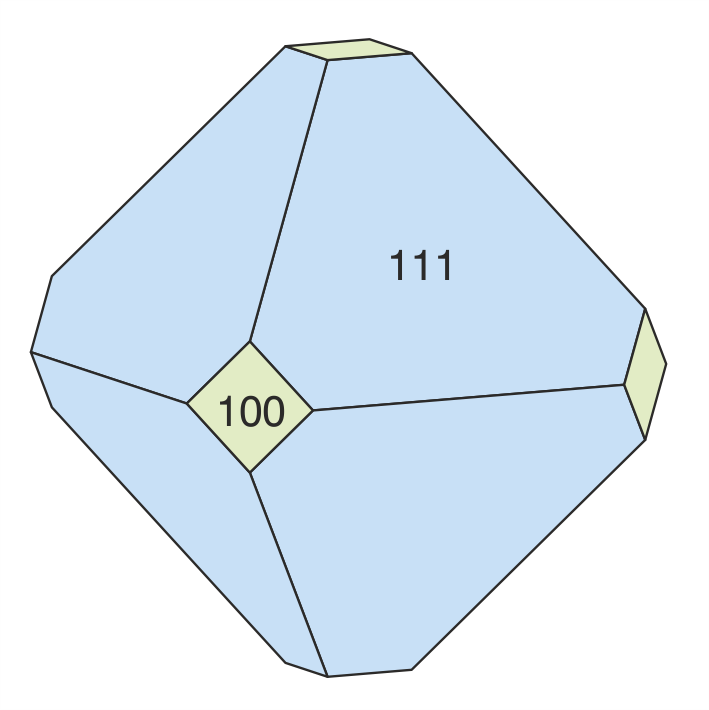 Zeichnung eines Hydroxykenomikrolith-Kristalls als Kuboktaeder (Kombination aus Oktaeder {111} und Hexaeder {100})